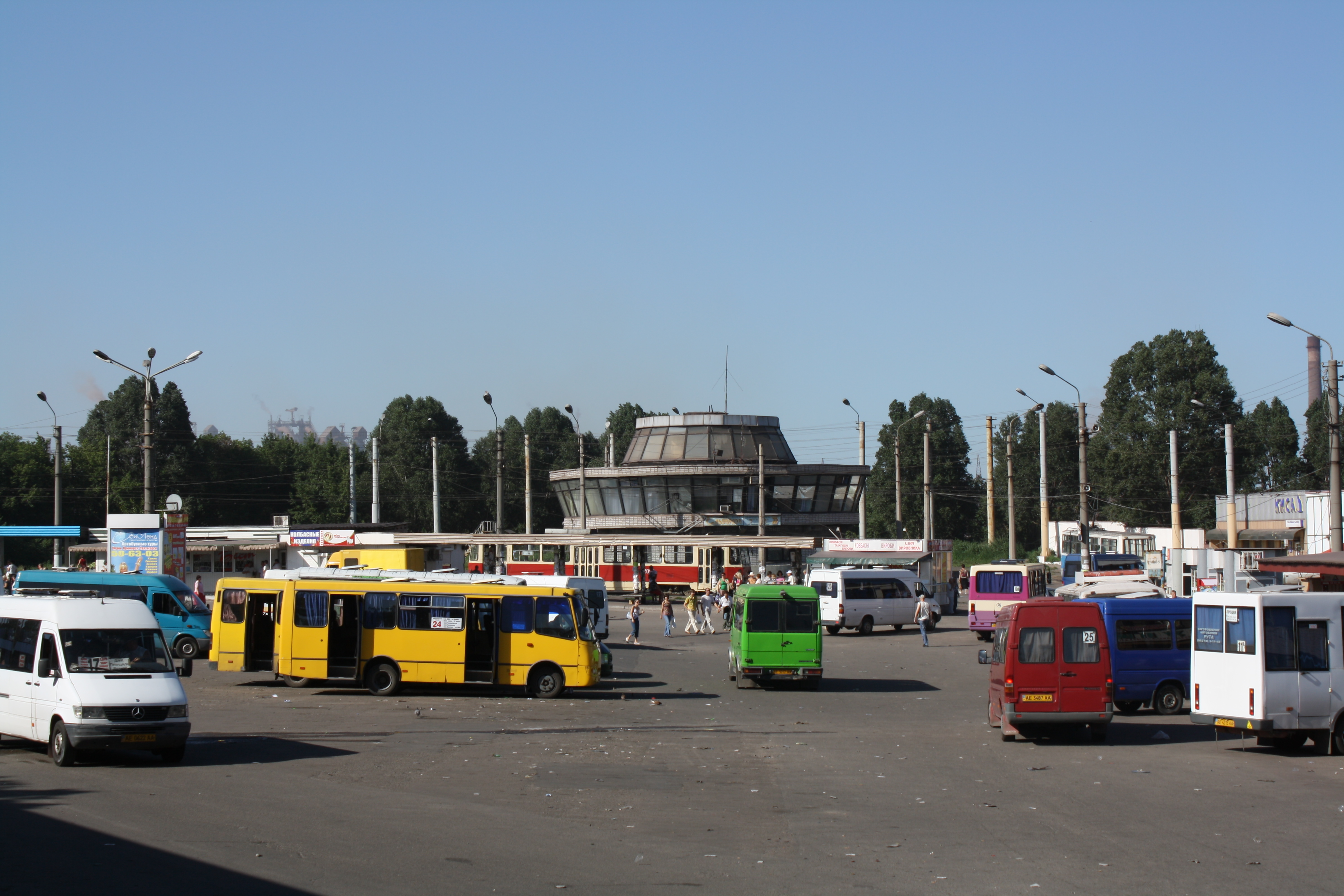 Площа ДМК у Дніпродзержинську (Головний транспортний вузол міста)